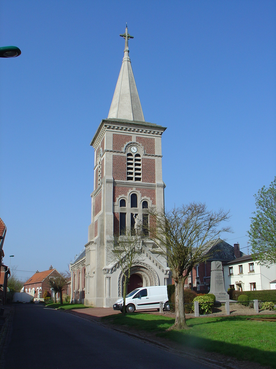 Église de Fresnoy-en-Gohelle